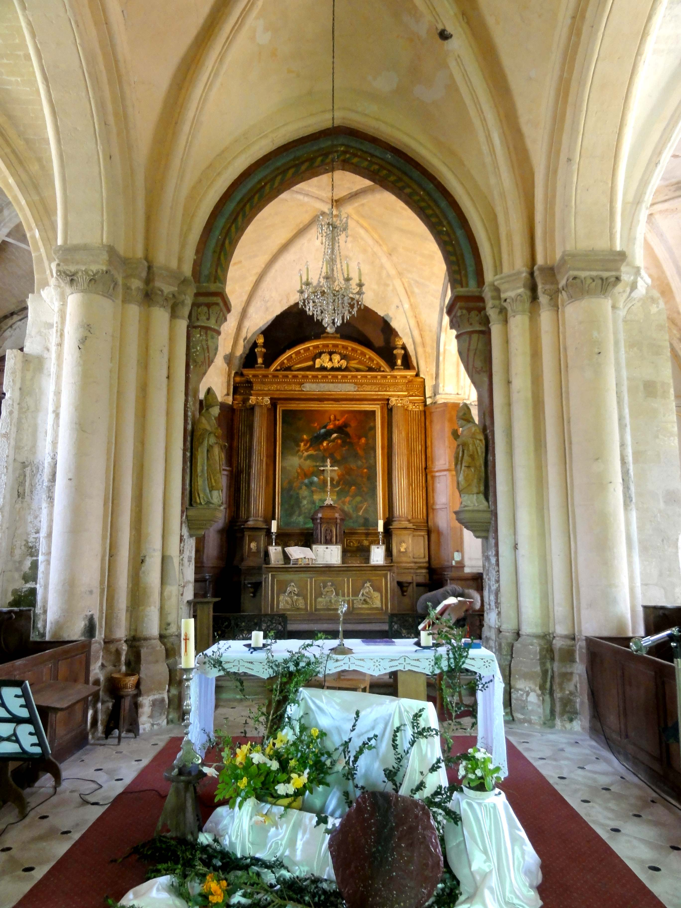 Intérieur de l'église (voir titre).